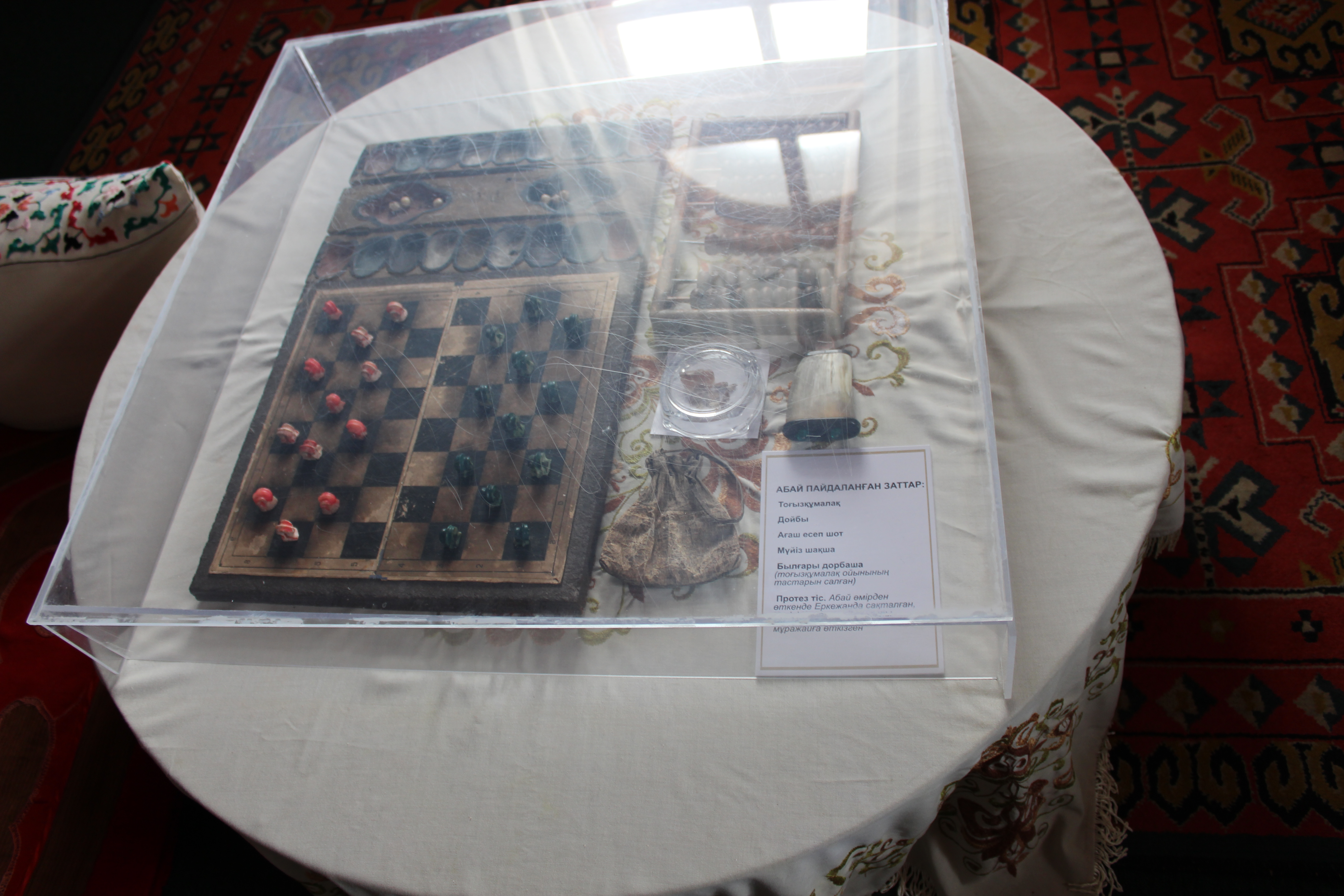 Қазақша (кирил): Абай пайдаланған заттар